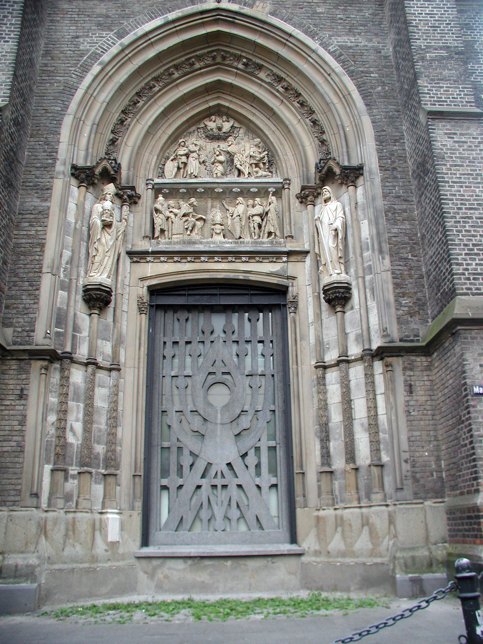 St. Mauritius. Köln-Portal